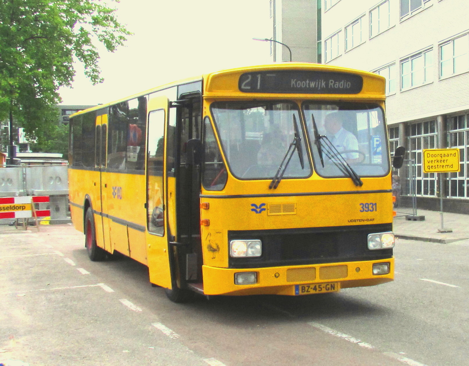 Bus 3931 van Den Oudsten met DAF-chassis met aanduiding lijn 21 van de VAD (Verenigde Autobus Diensten) (Apeldoorn-Radio Kootwijk), die liep tot mei 2000, even terug in Apeldoorn voor Open Monumentendag 2011. Bouwjaar 1988[1]